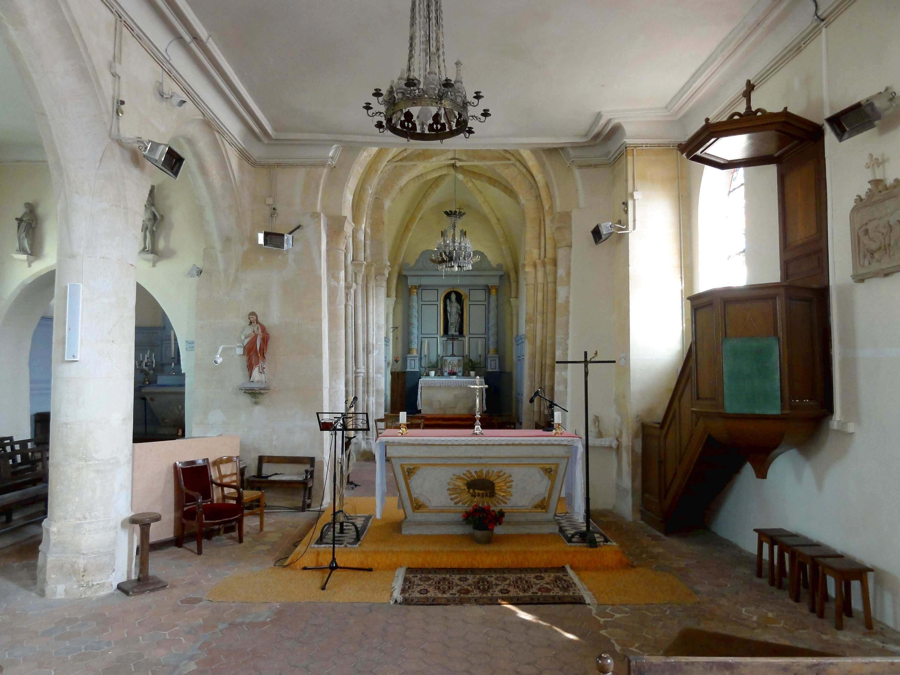 Intérieur de l'église - voir titre.